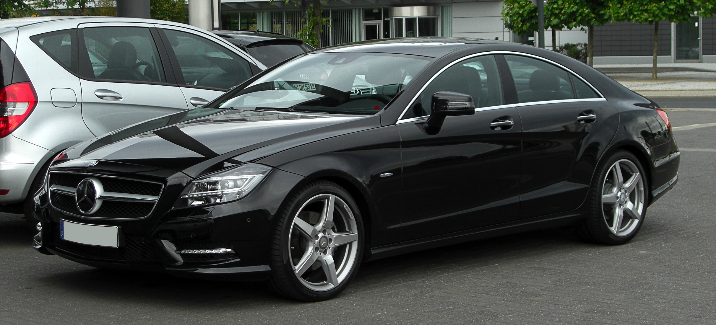 Mercedes-Benz CLS 500 BlueEFFICIENCY Sport-Paket AMG (C 218)